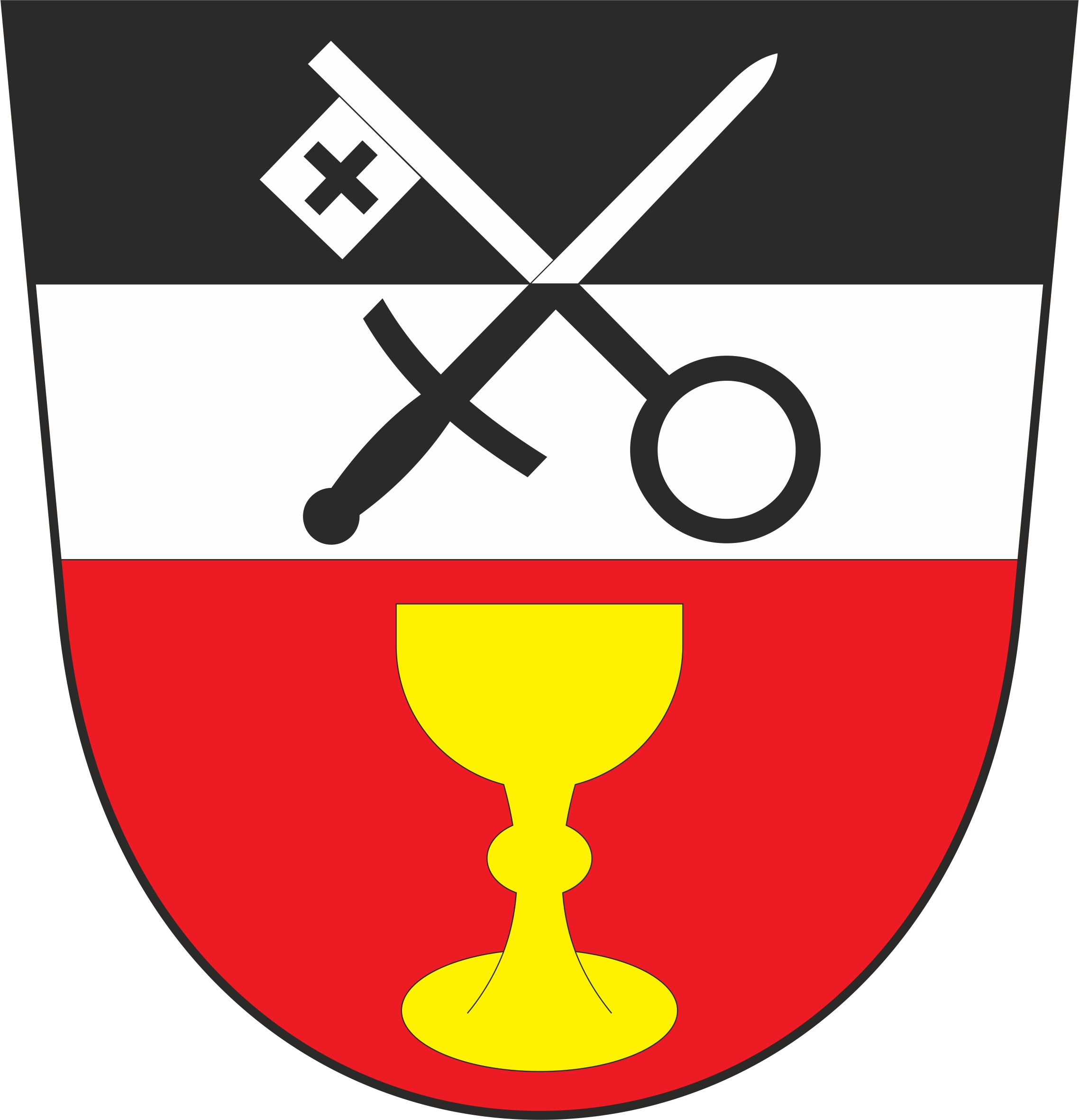 Znak Malčína